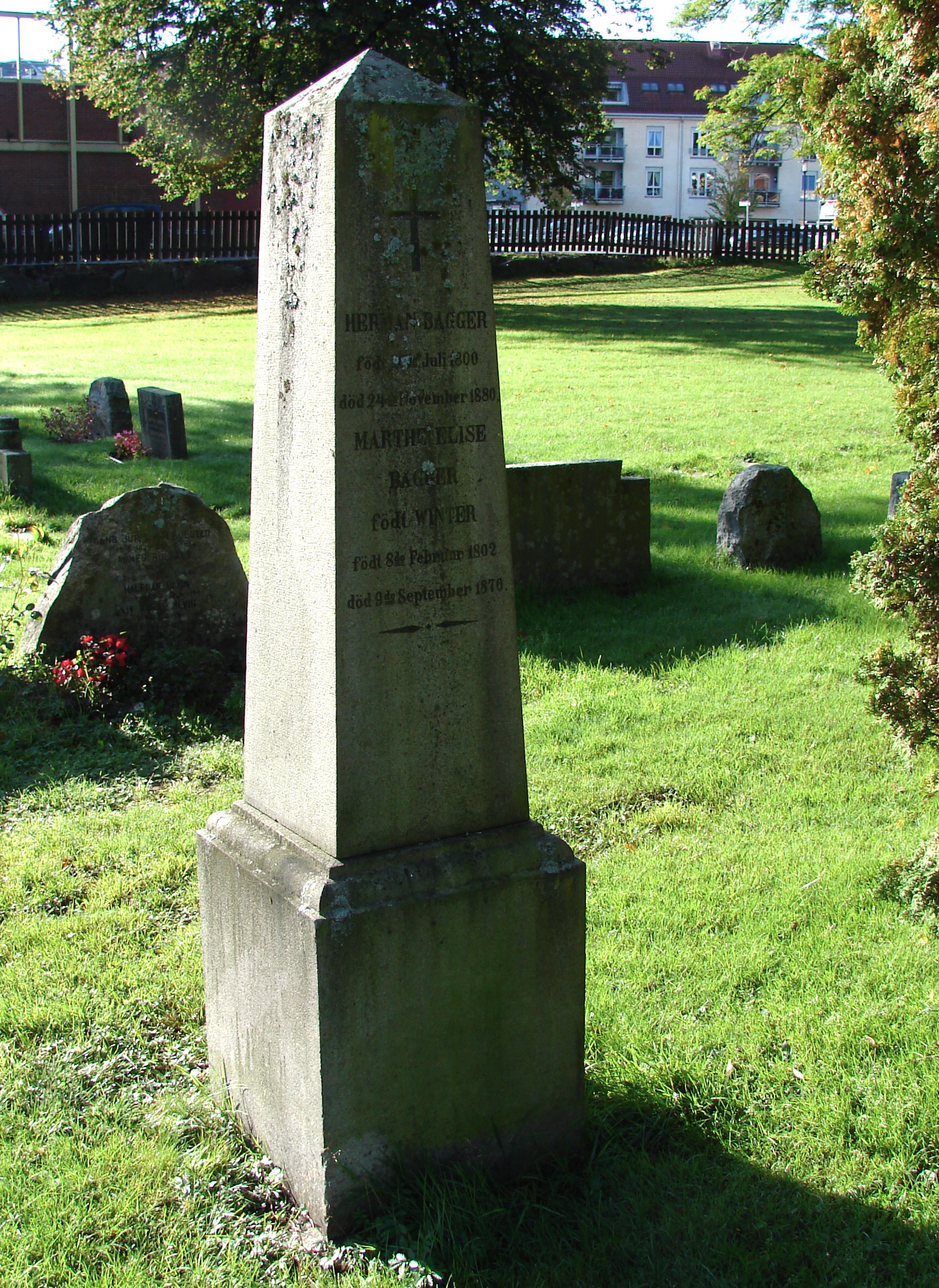 Herman Bagger, födt 20de Juli 1800, död 24de November 1880, Marthe Elise Bagger, födt Winter, födt 8de Februar 1802, död 9de September 1870, gravminde på Lie kirkegård, Skien, Norge